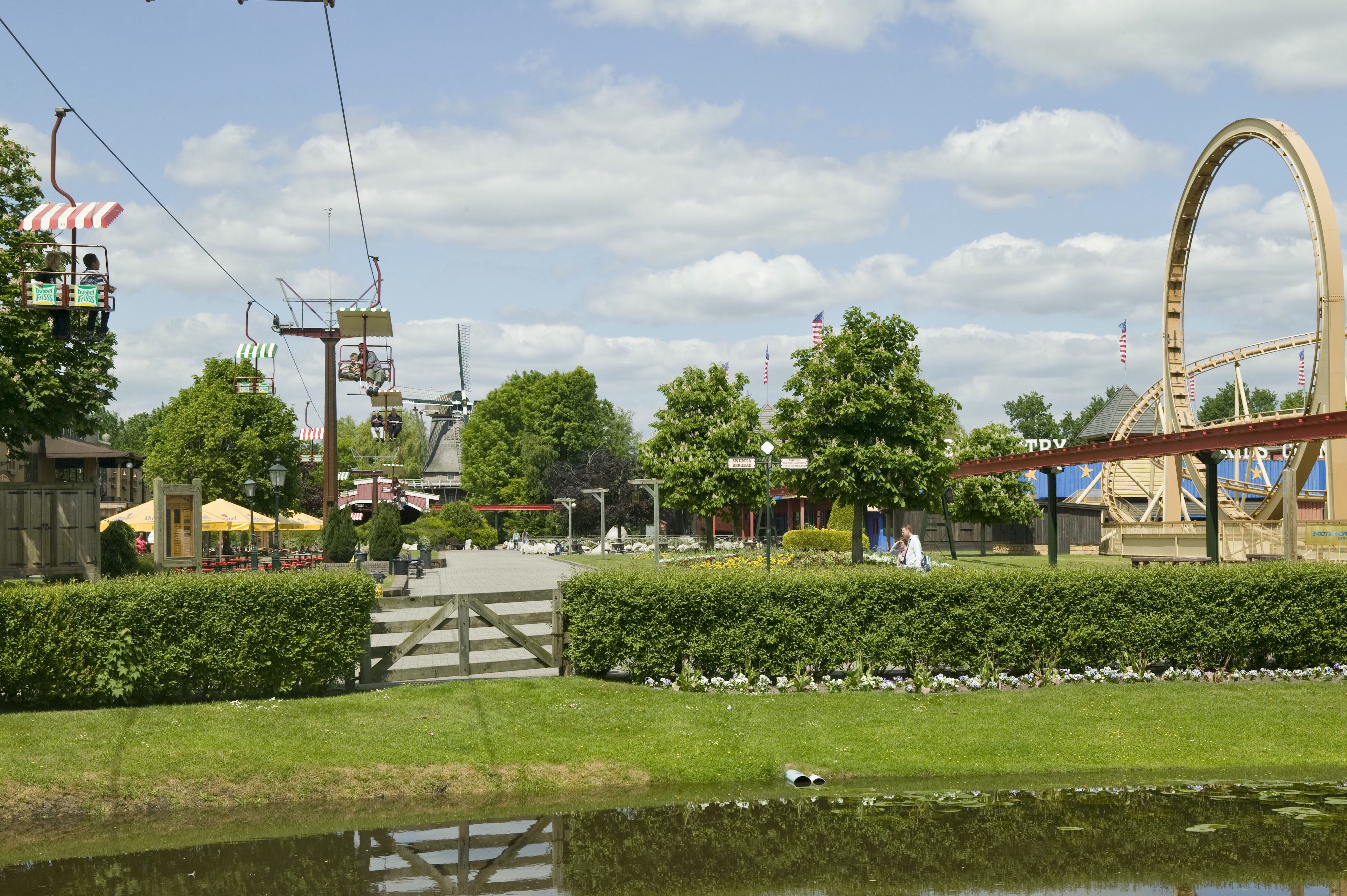 De Pionier: Overzicht van de molen in het park, gelegen tussen de attracties (opmerking: Project RRWR)